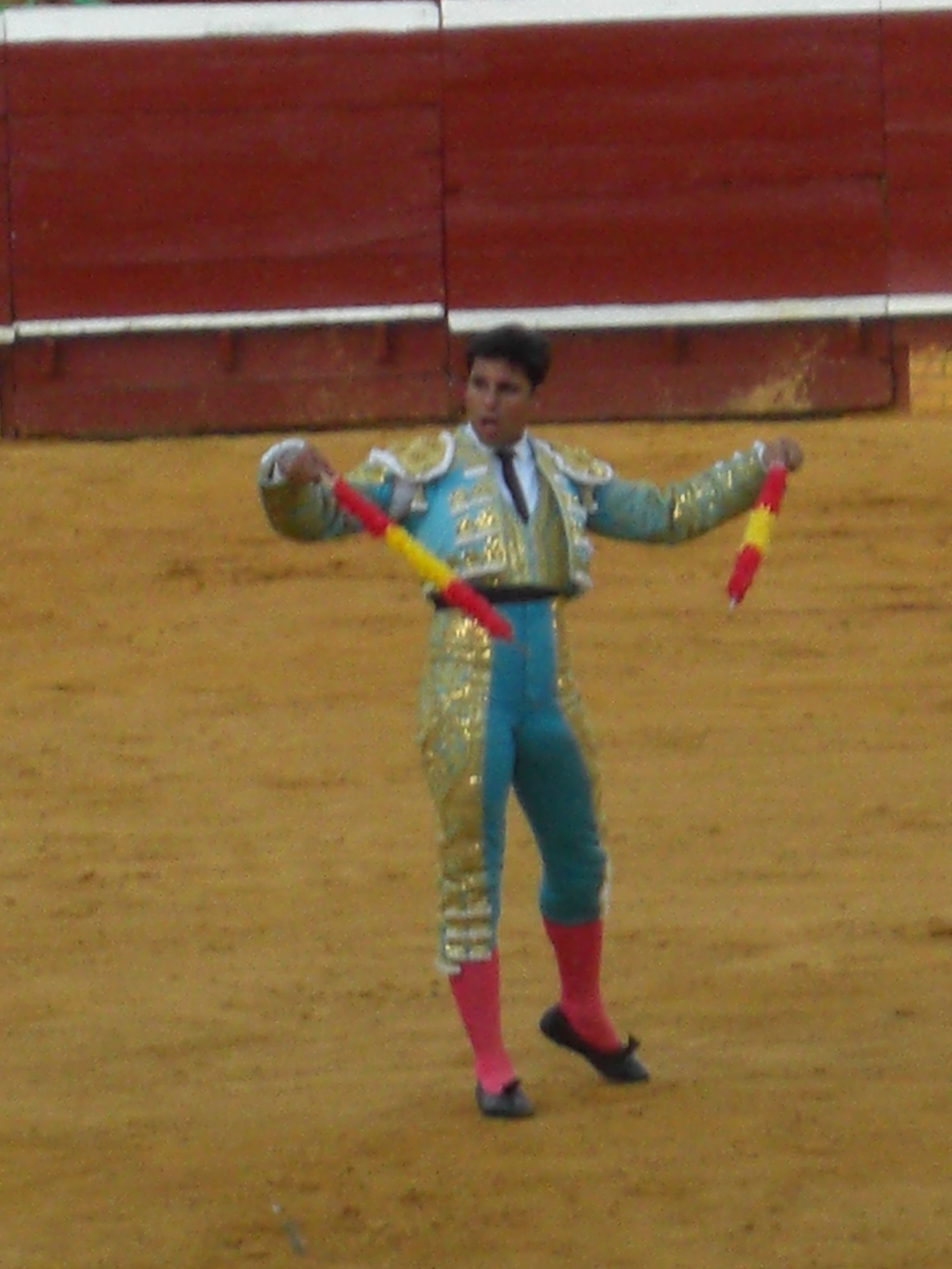 Fran Rivera como banderillero en las fiestas Colombinas 2008 en Huelva (España).